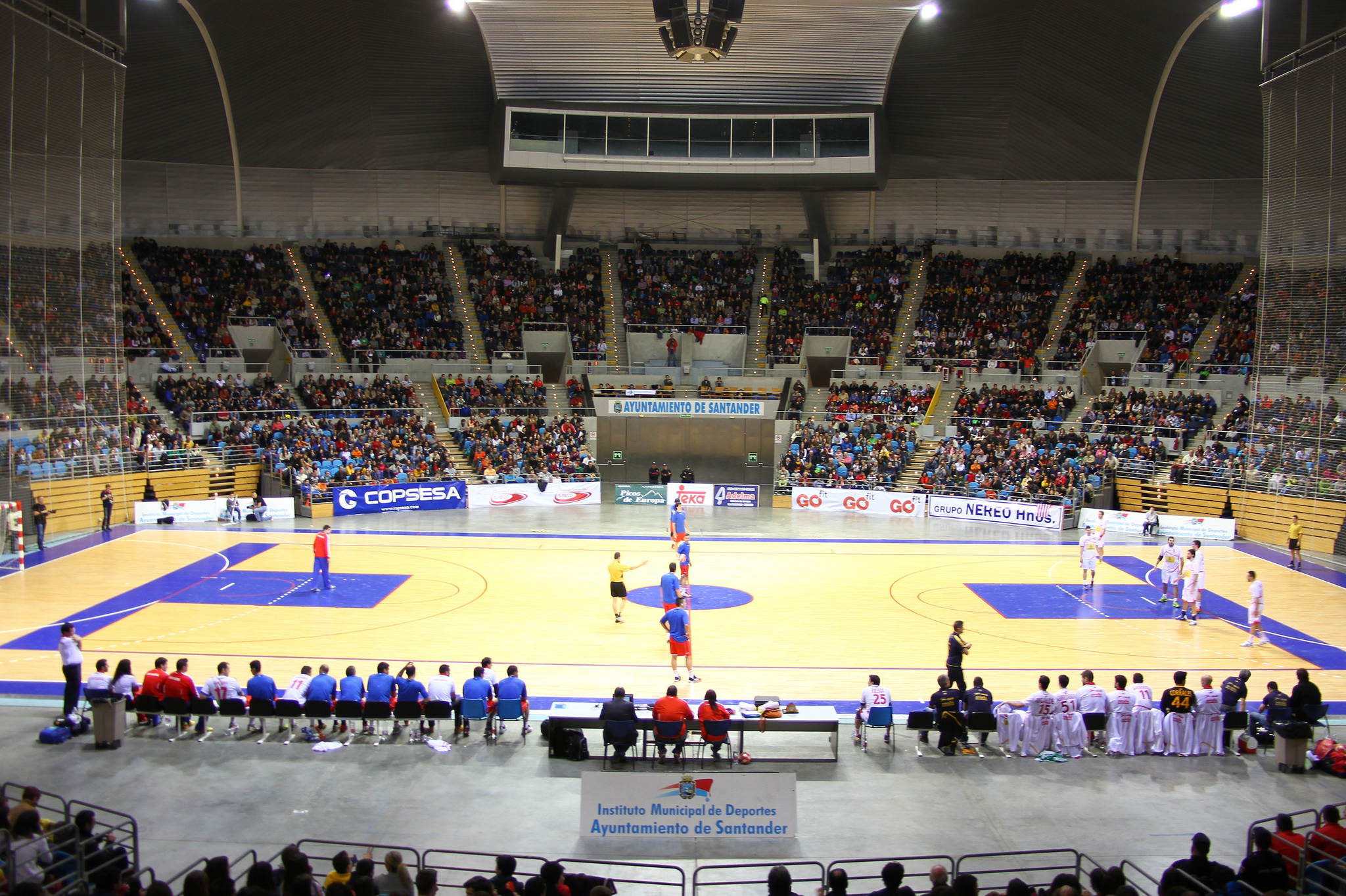 Fotografía del Palacio de los Deportes de Santander, en el encuentro amistoso entre la Selección Española de Balonmano y la de Cantabria jugado en el 2013, con 5700 espectadores.